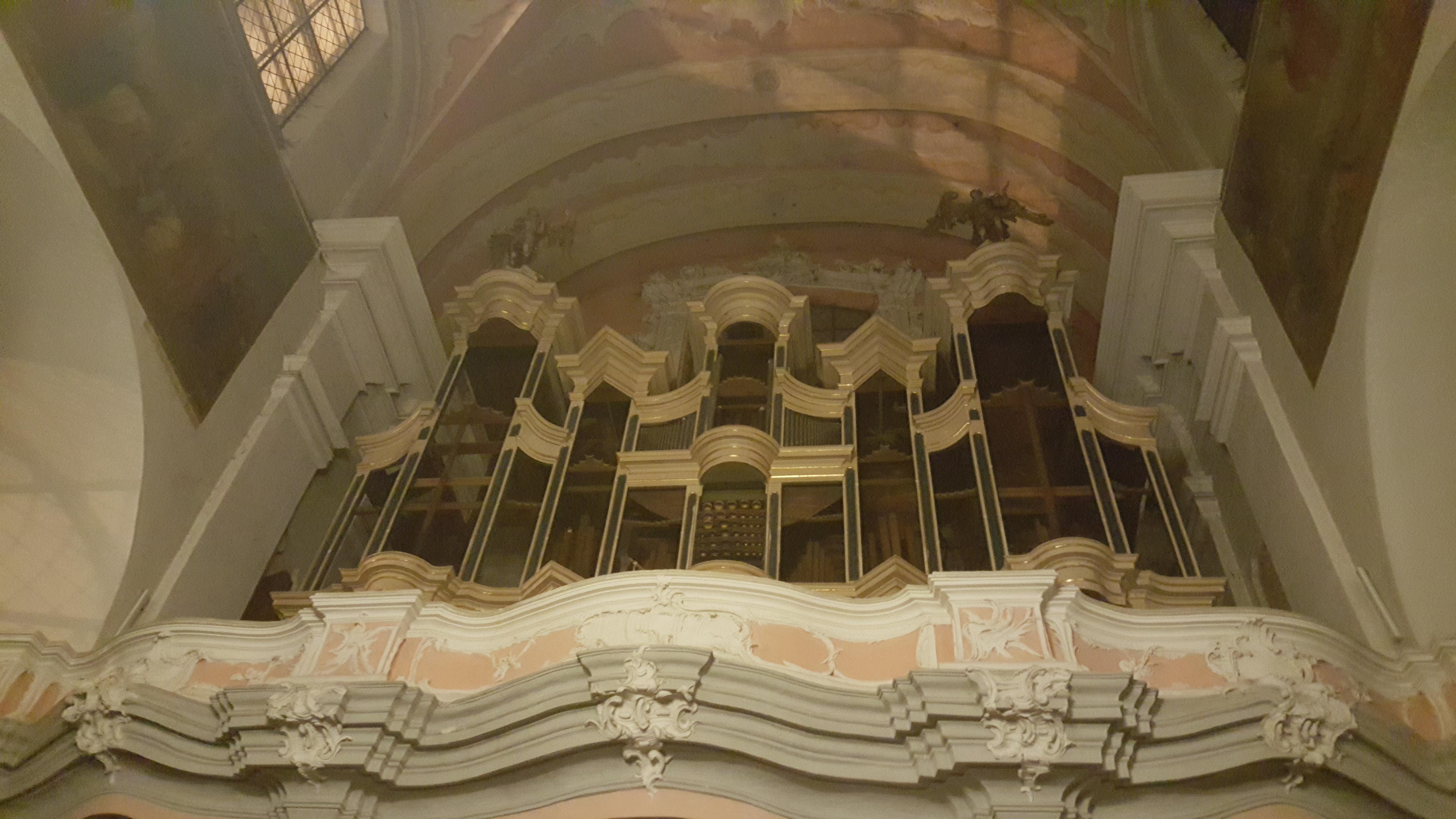 Bažnyčios vargonai